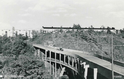 Kvarnholmsbron med Kvarnholmen i bakgrunden.